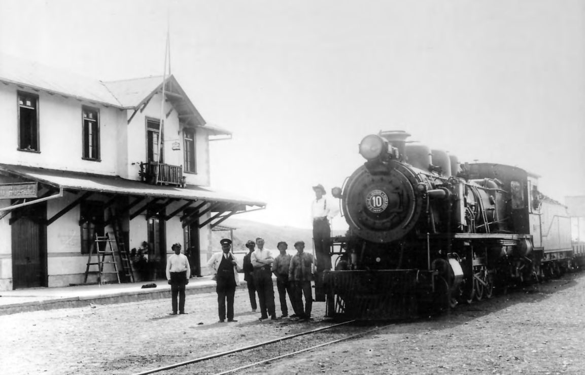 Estación de ferrocarril de Alto Hospicio, c.1930.